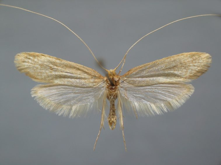 Nematopogon swammerdamella